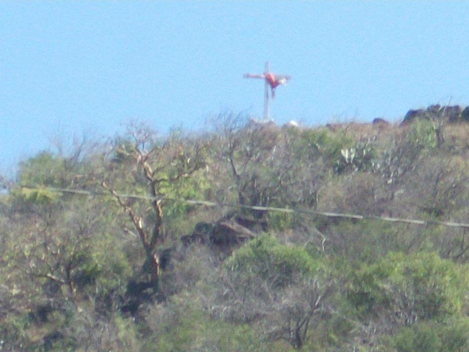 La famosa cruz en el cerro de Monteleon